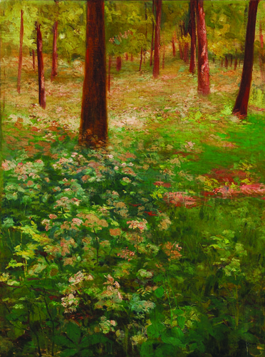 Eliseu Visconti - Primavera - 1895 PRIMAVERA-OST-60x45-1895-COLEÇÃO PARTICULAR